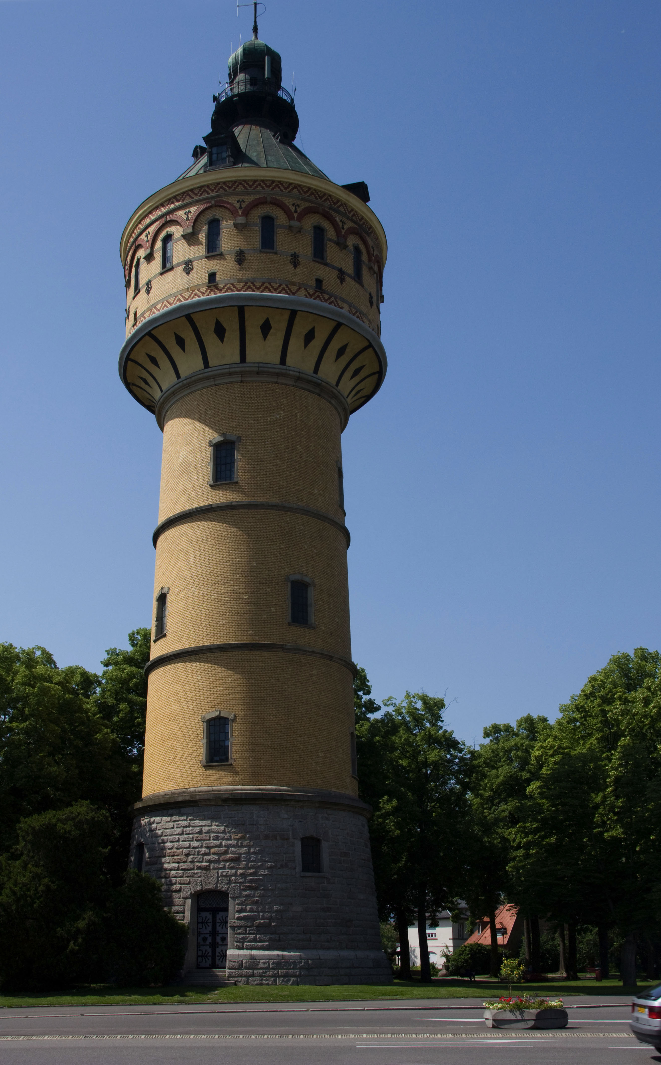 Sélestat, Bas-Rhin (Alsace, France).